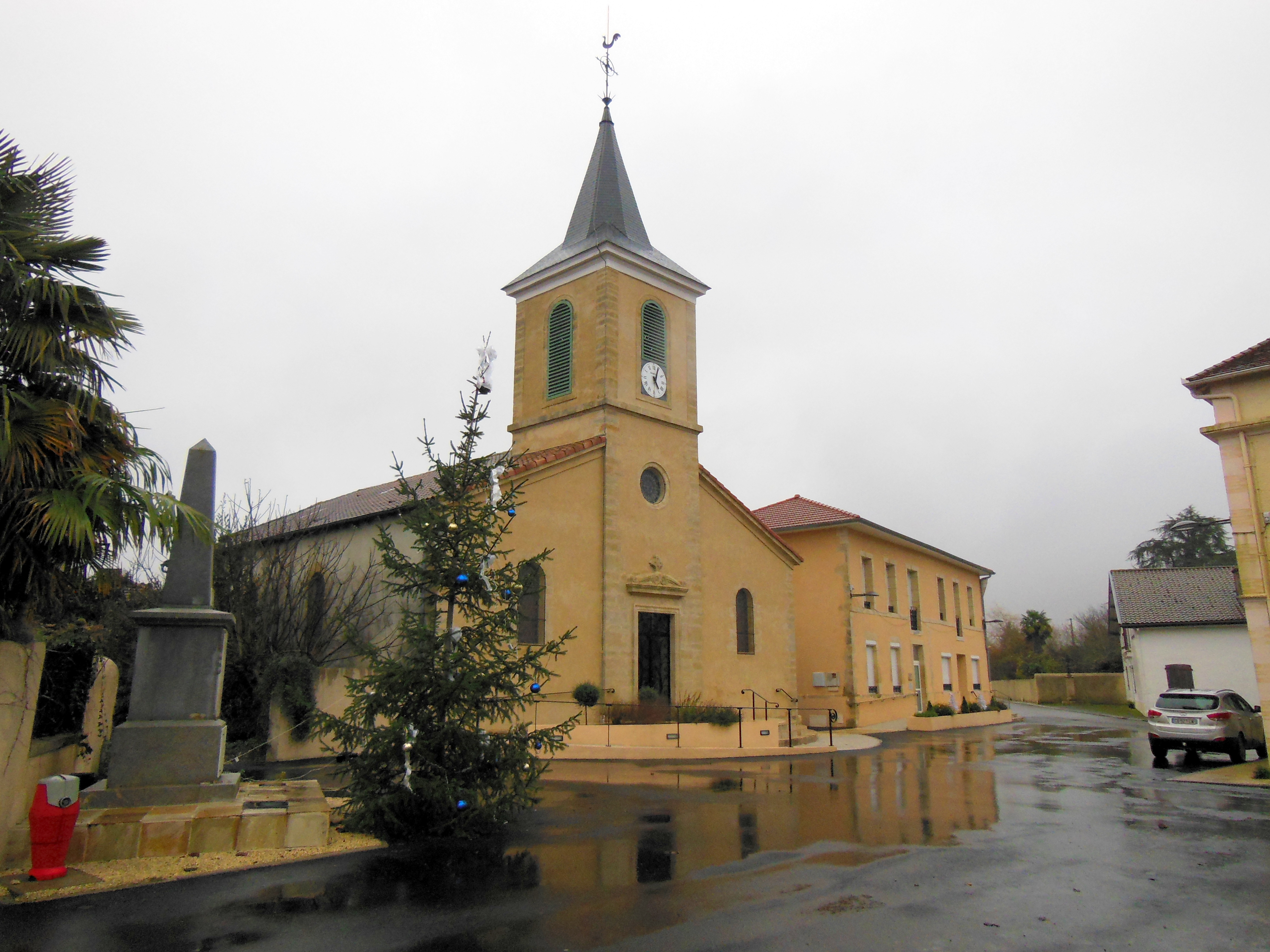 Place de l'église de Mant (Landes, France)